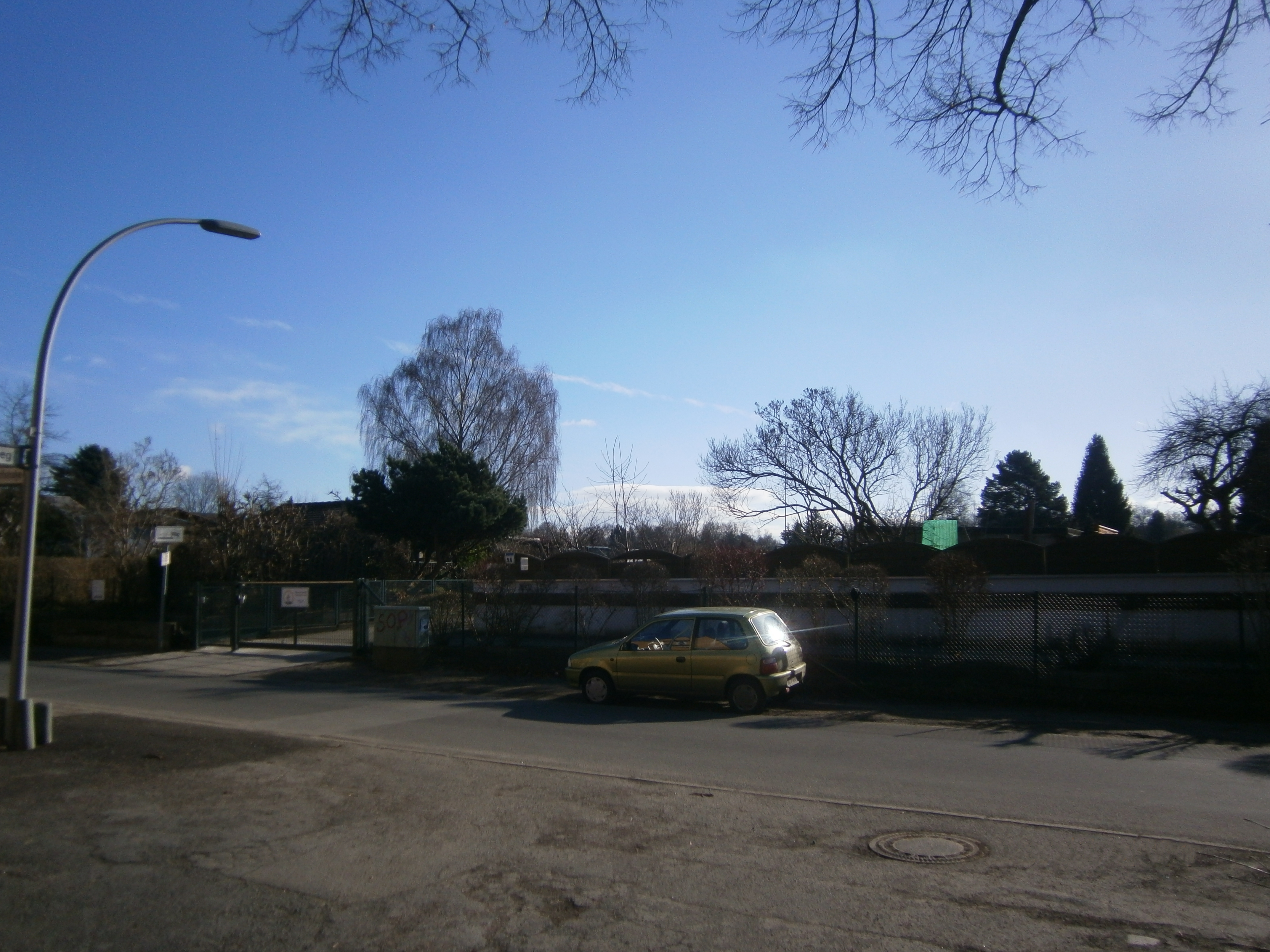 Die Benekendorffstraße ist eine Straße in Berlin-Lübars. Hier der Blick von der Straßenkreuzung auf die Südseite ggü. vom Tonstichweg zur KGA Frohsinn I, die an der Benekendorffstraße liegt.